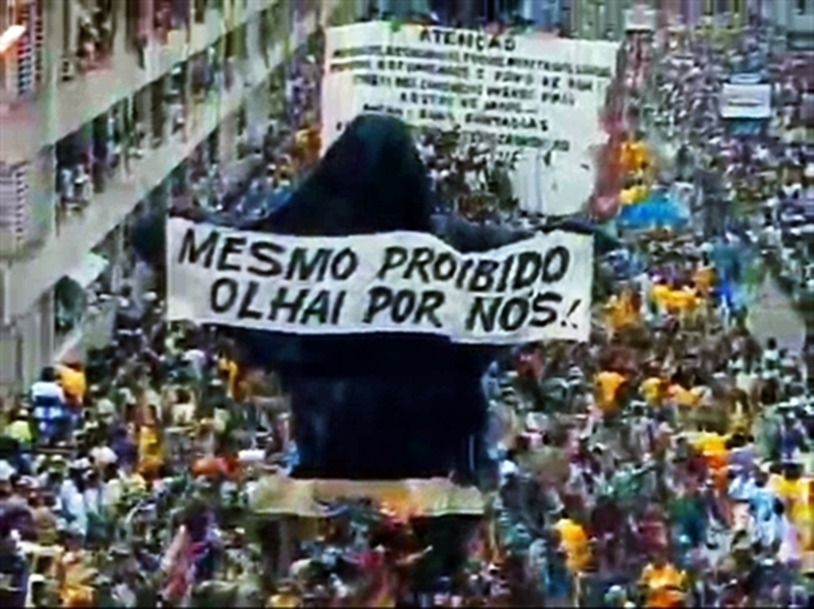 Rio Sambodrome 2